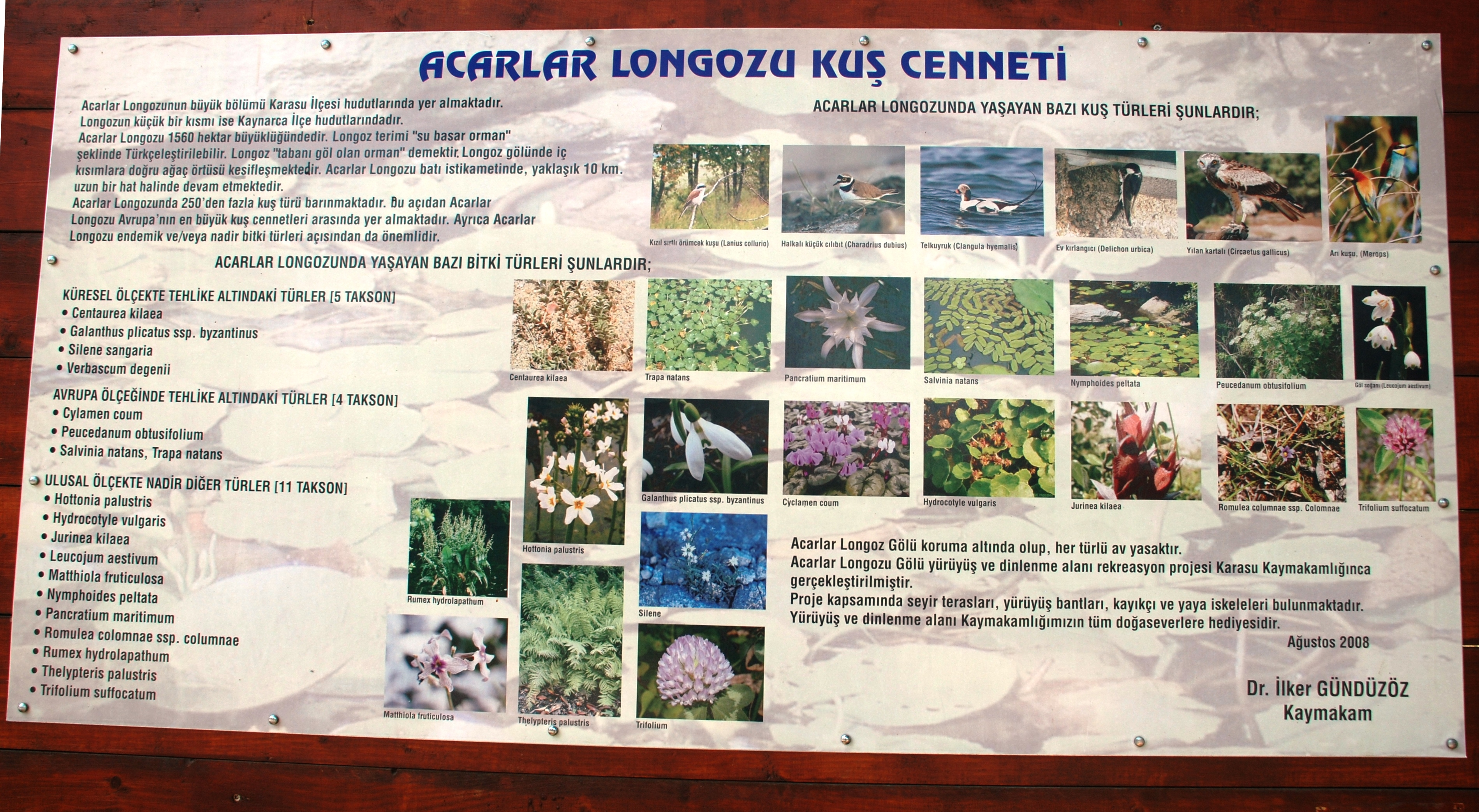 Acarlar Longozu tanıtım panosu, Karasu